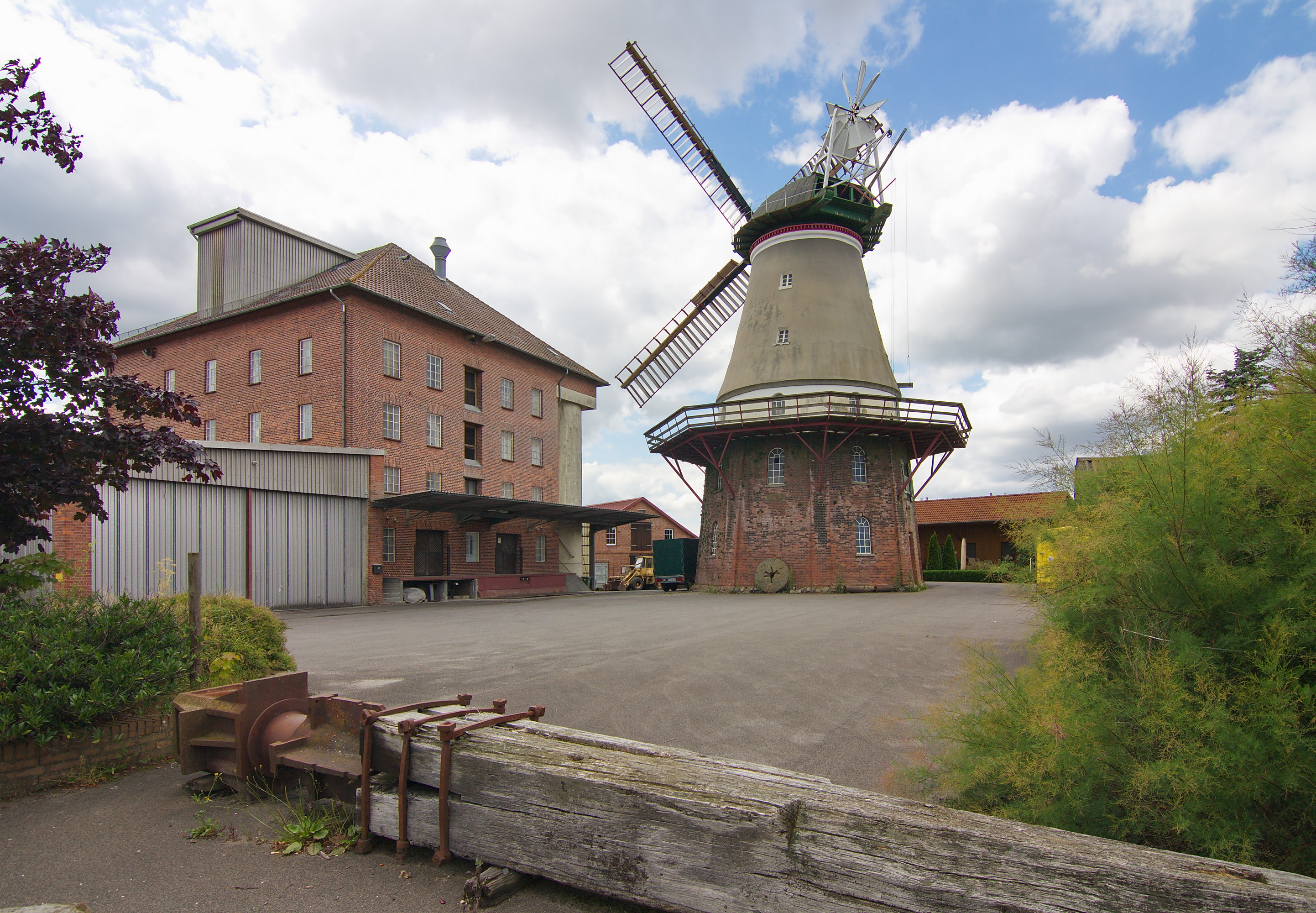 Galerieholländerwindmühle von 1857 in Dörverden, Niedersachsen, Deutschland.